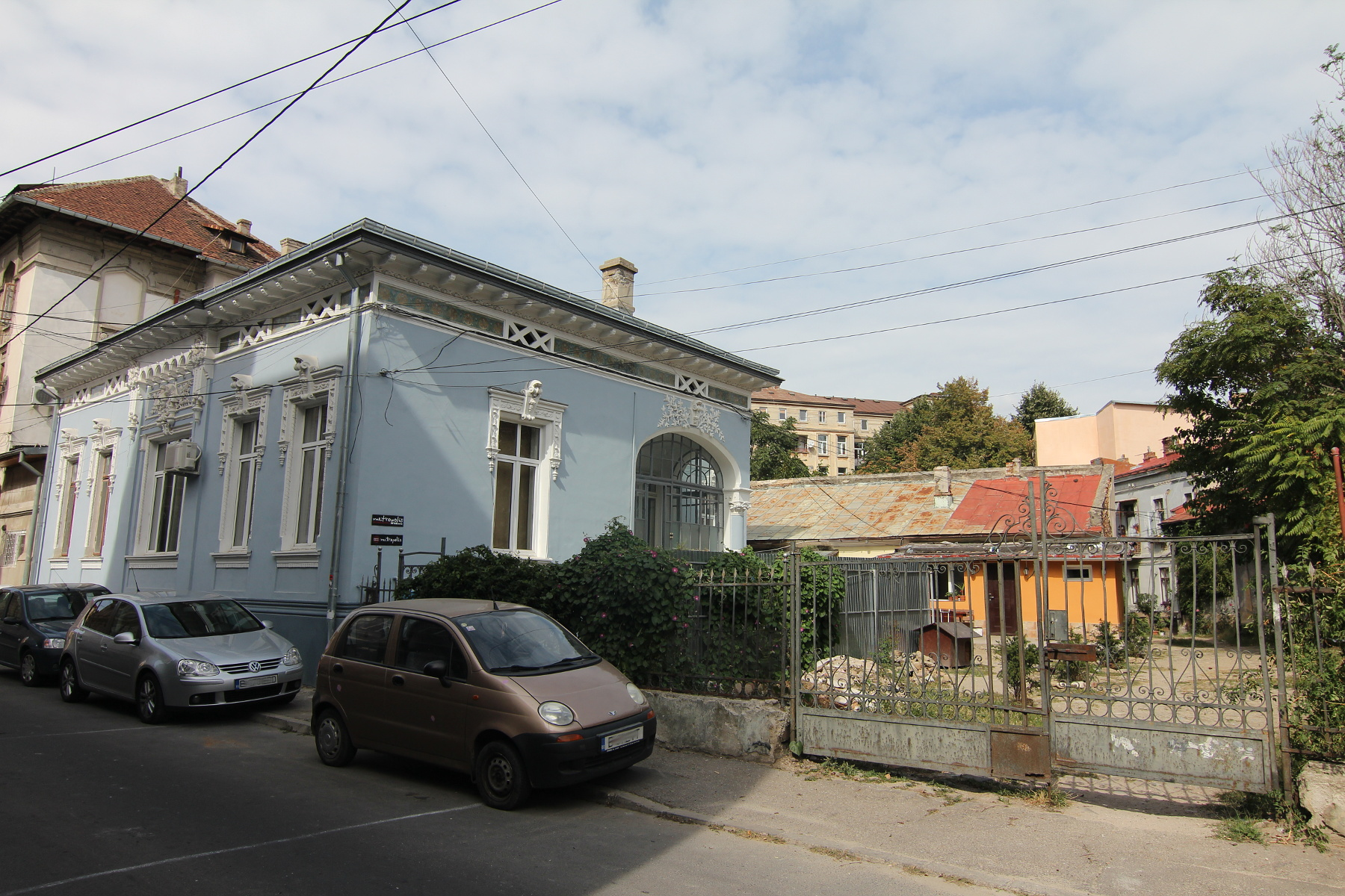 Casă pe Str Robescu